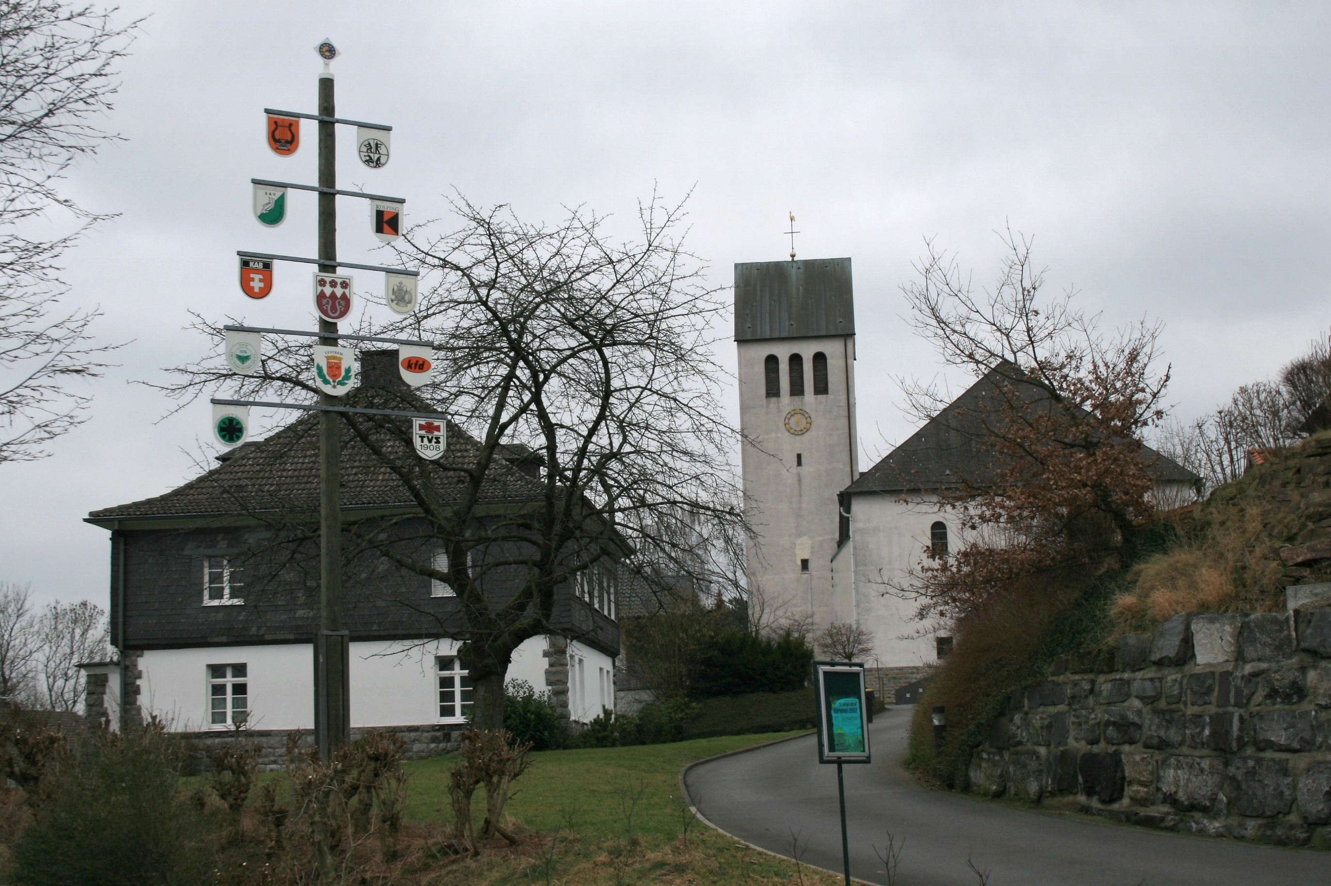 Katholische Kirche „Mariä Heimsuchung und St. Apollonia“ (erbaut 1948) im Ortsteil Schwitten der Stadt Menden (Sauerland).